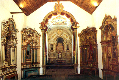 Interior da Igreja Matriz de Nossa Senhora do Rosáro, Pirenópolis. Construída em 1728 e incêndiada em 2002.